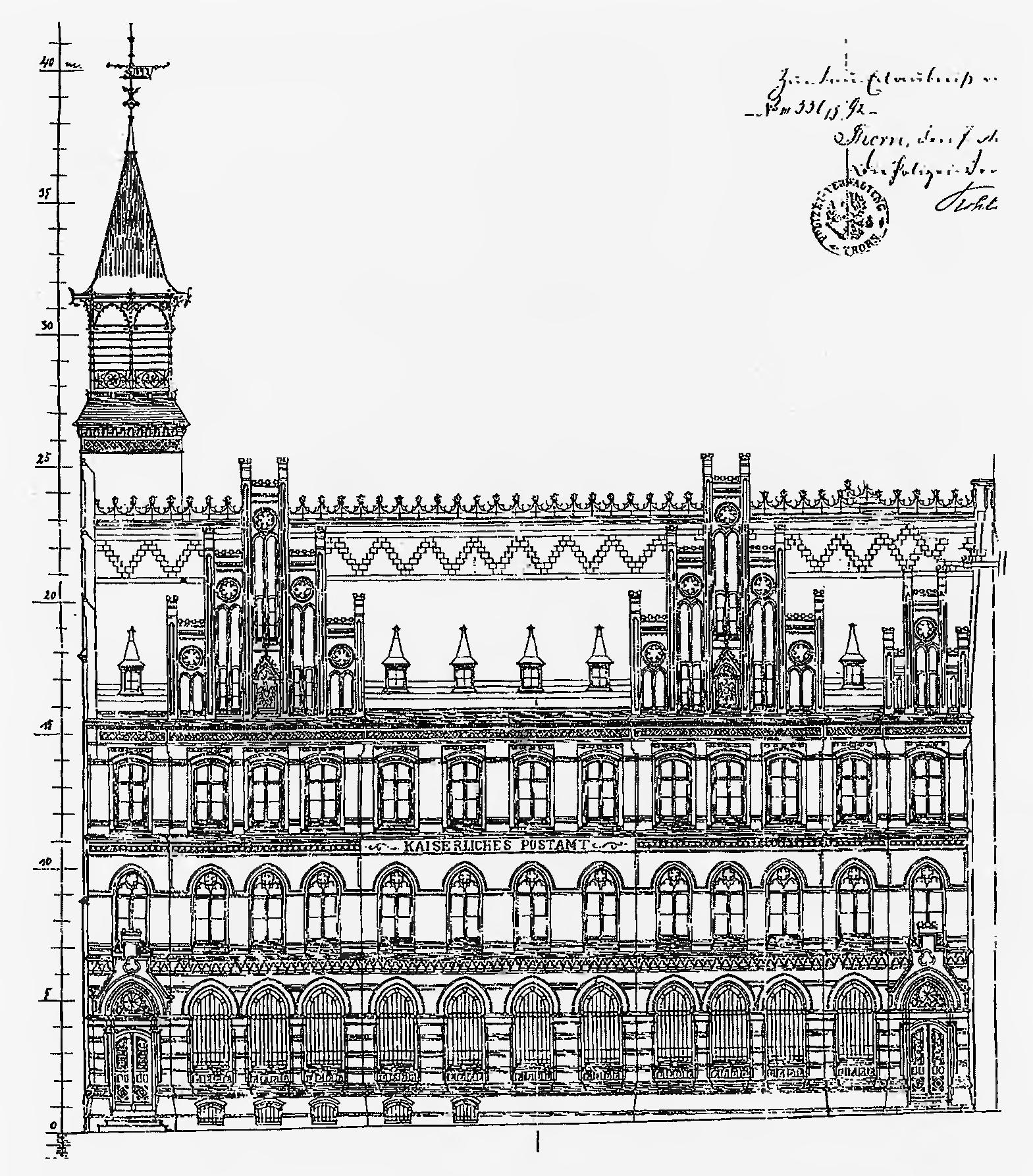 Projekt fasady urzędu pocztowego w Toruniu po rozbudowie